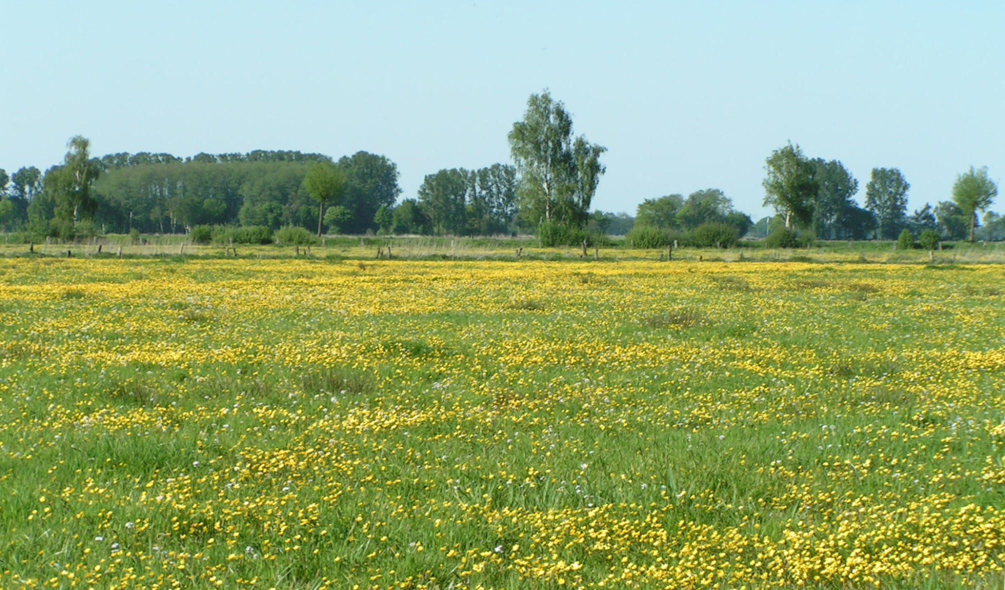 Feuchtwiese in Dümmerlohausen